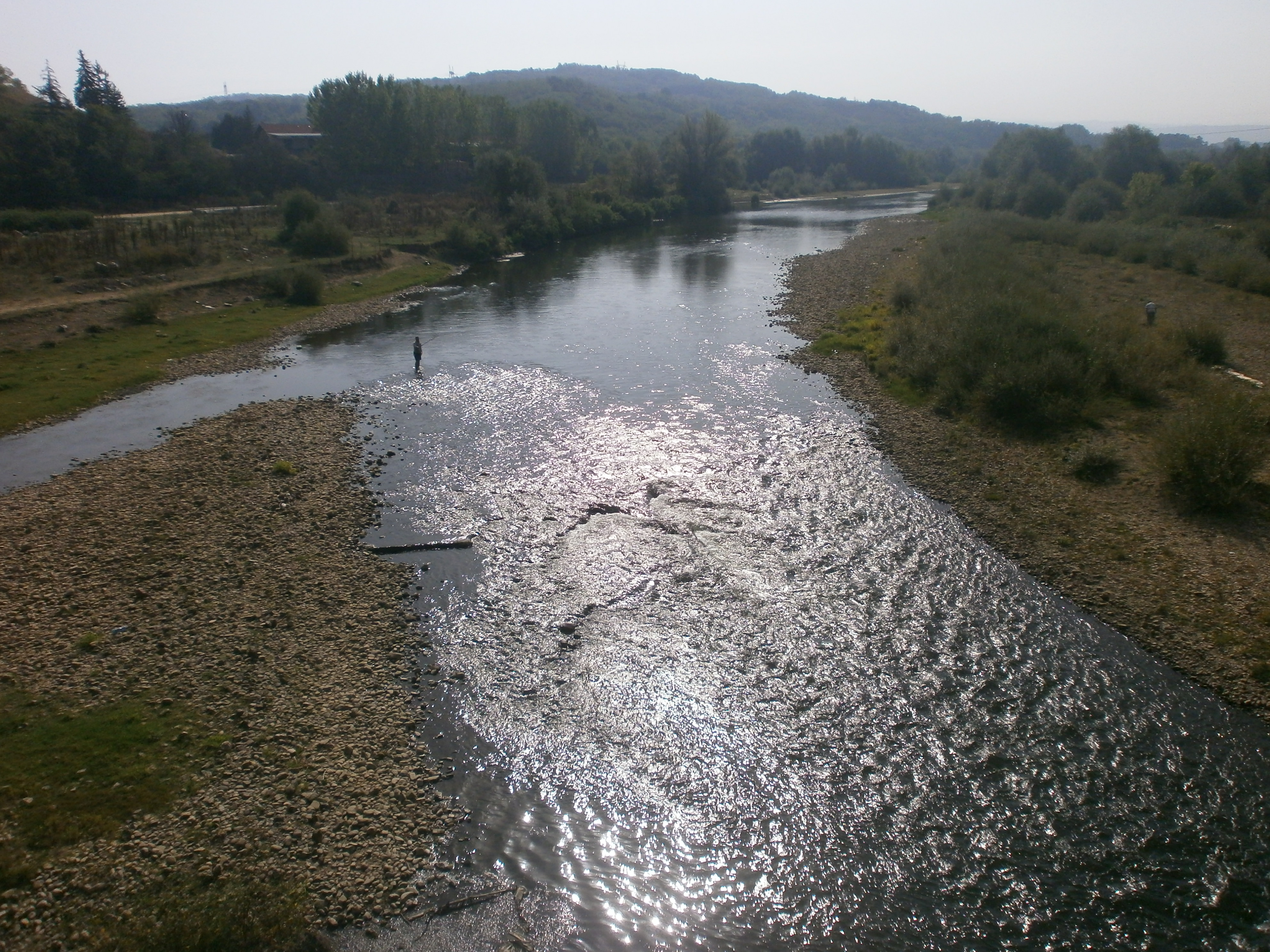 Srpski (latinica): Mala Biljanica, Leskovac